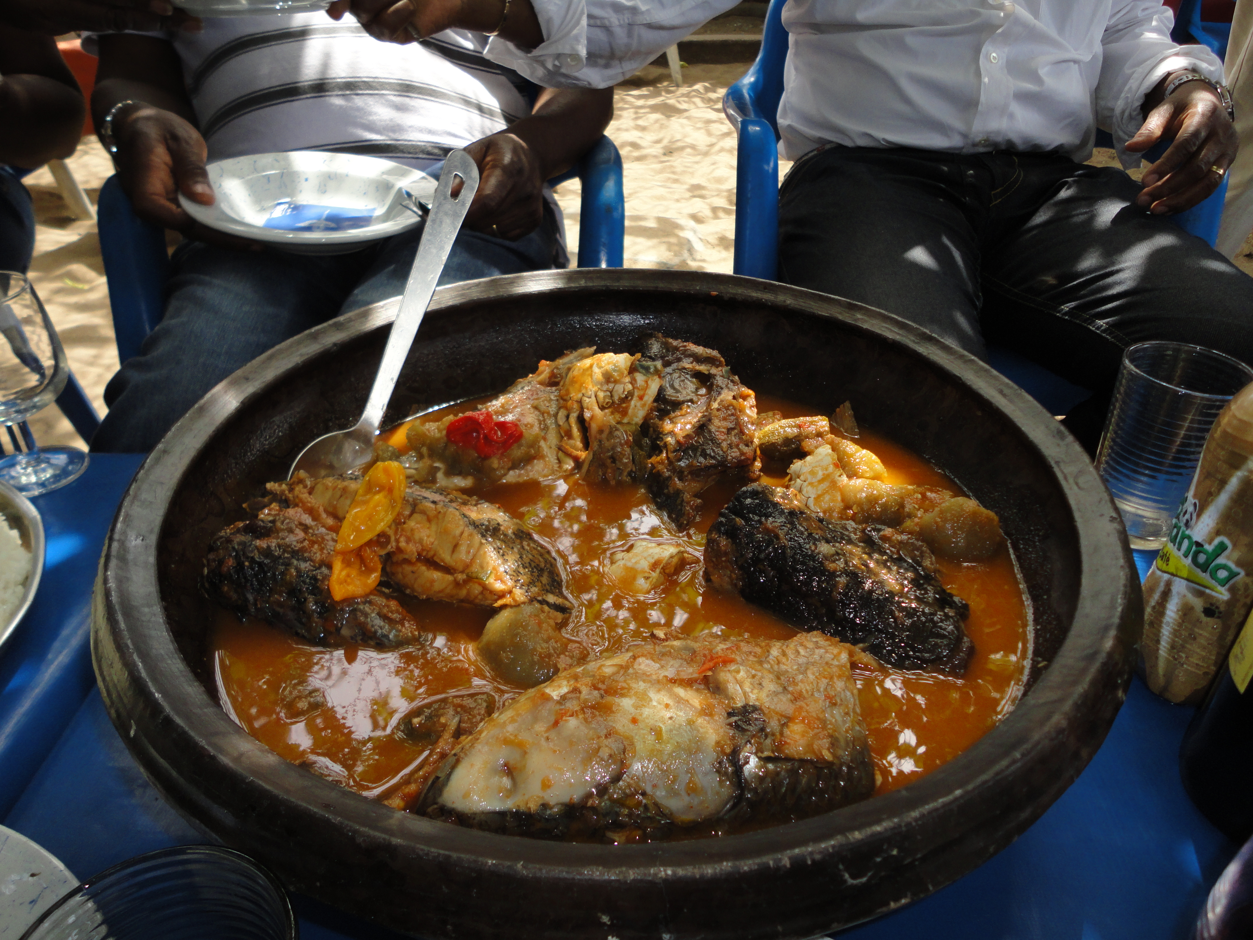 Soupe de poisson, crabe, escargot This is an image of food from Ivory Coast